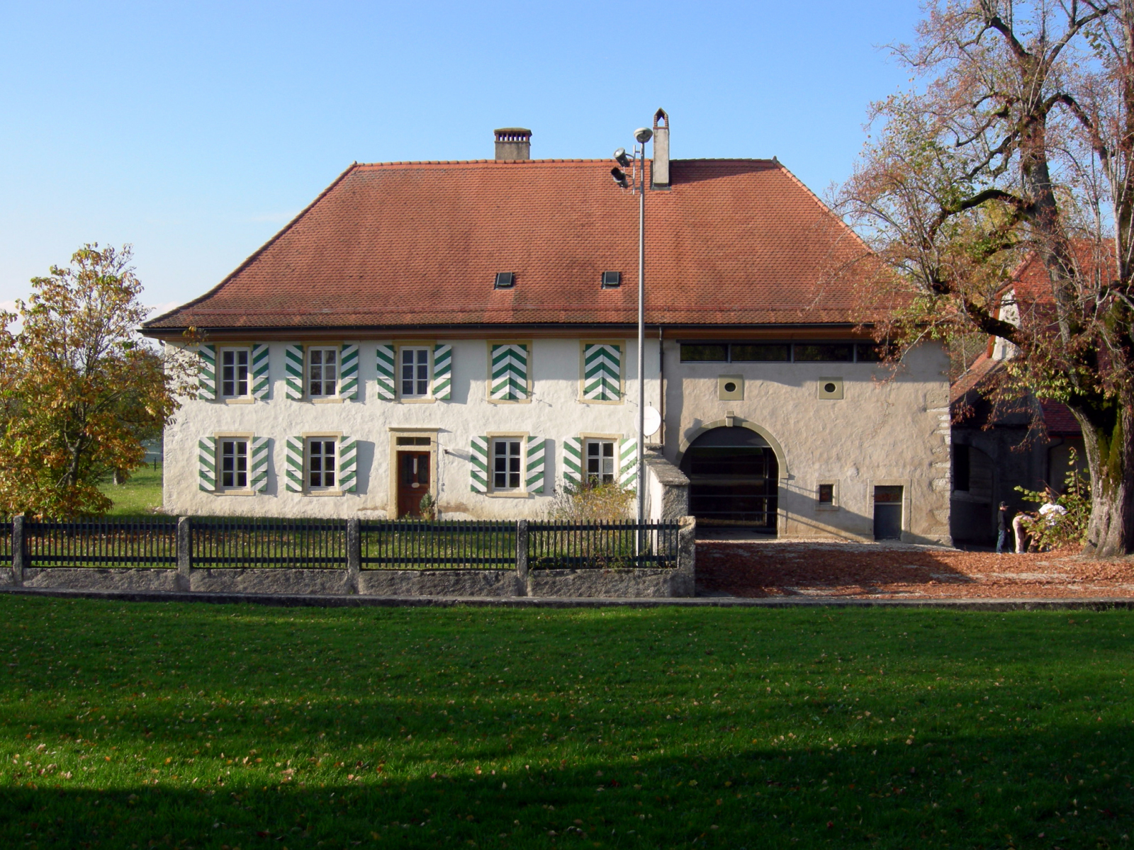 Chêne-Pâquier, Cure